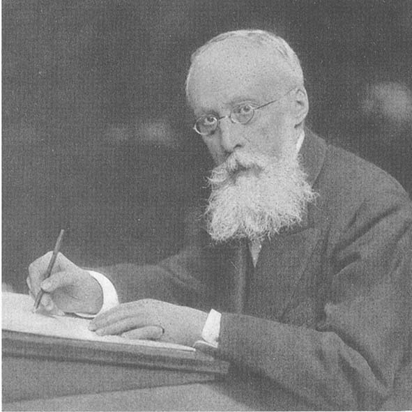 Foto di Graf (1848 Atene - 1913 Torino) poeta e critico italiano. Categoria:Immagini di poeti italiani